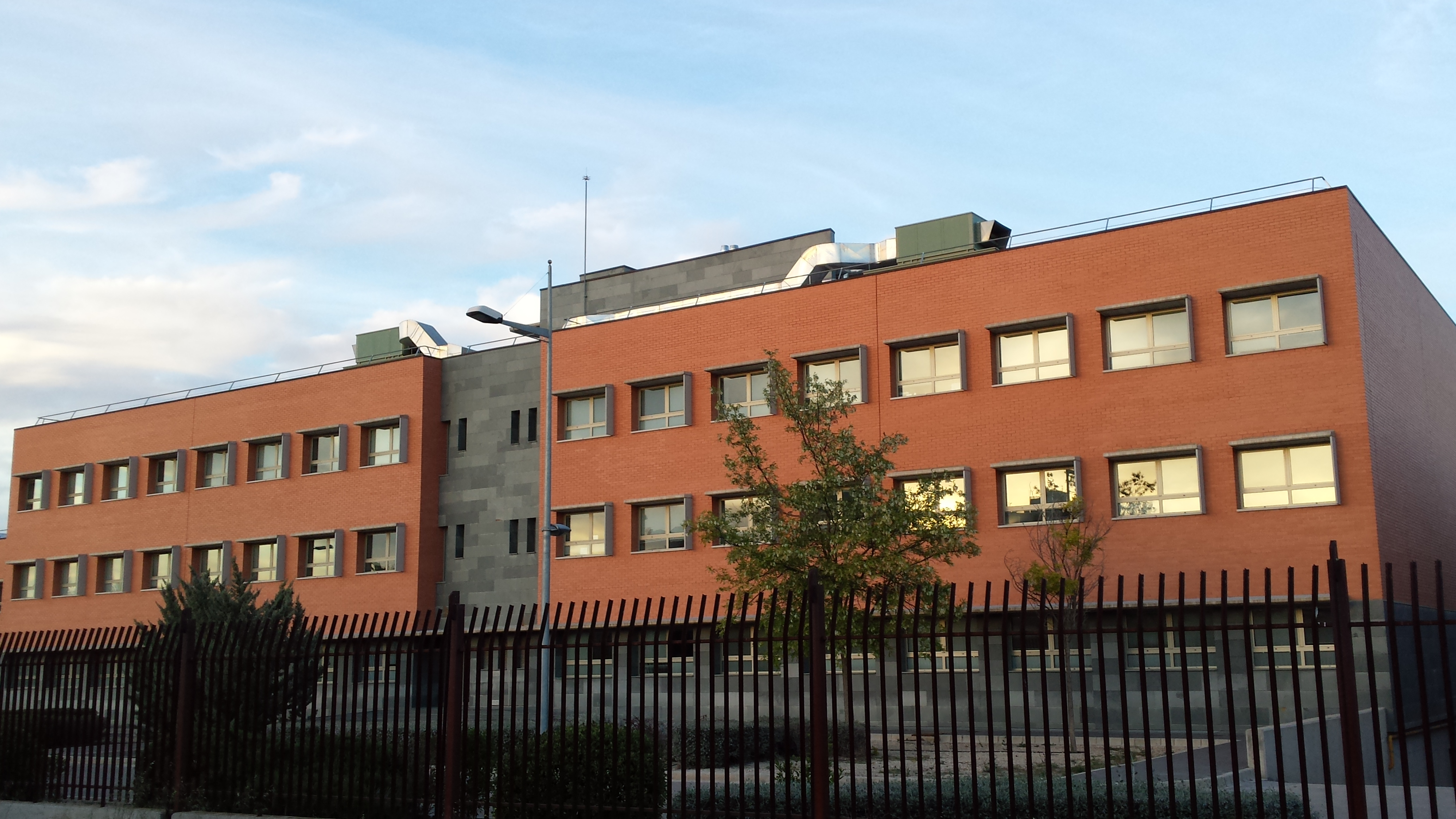 Centro Regional de Investigaciones Biomédicas.